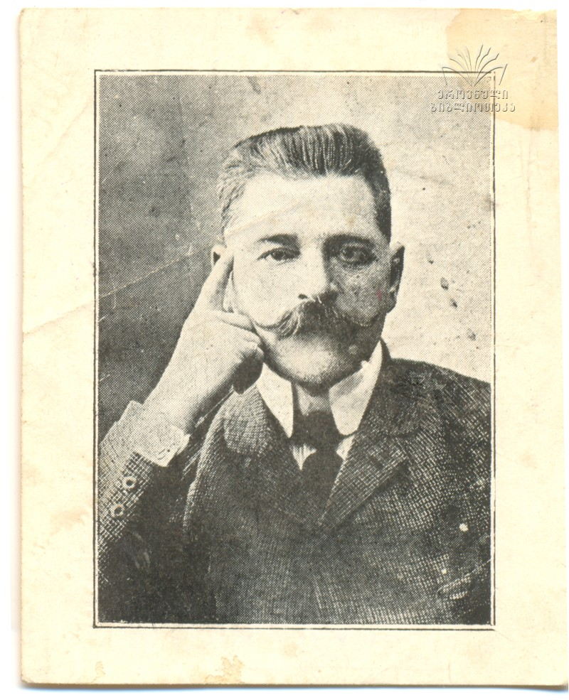 იასე რაჭველი (მეხუზლა)